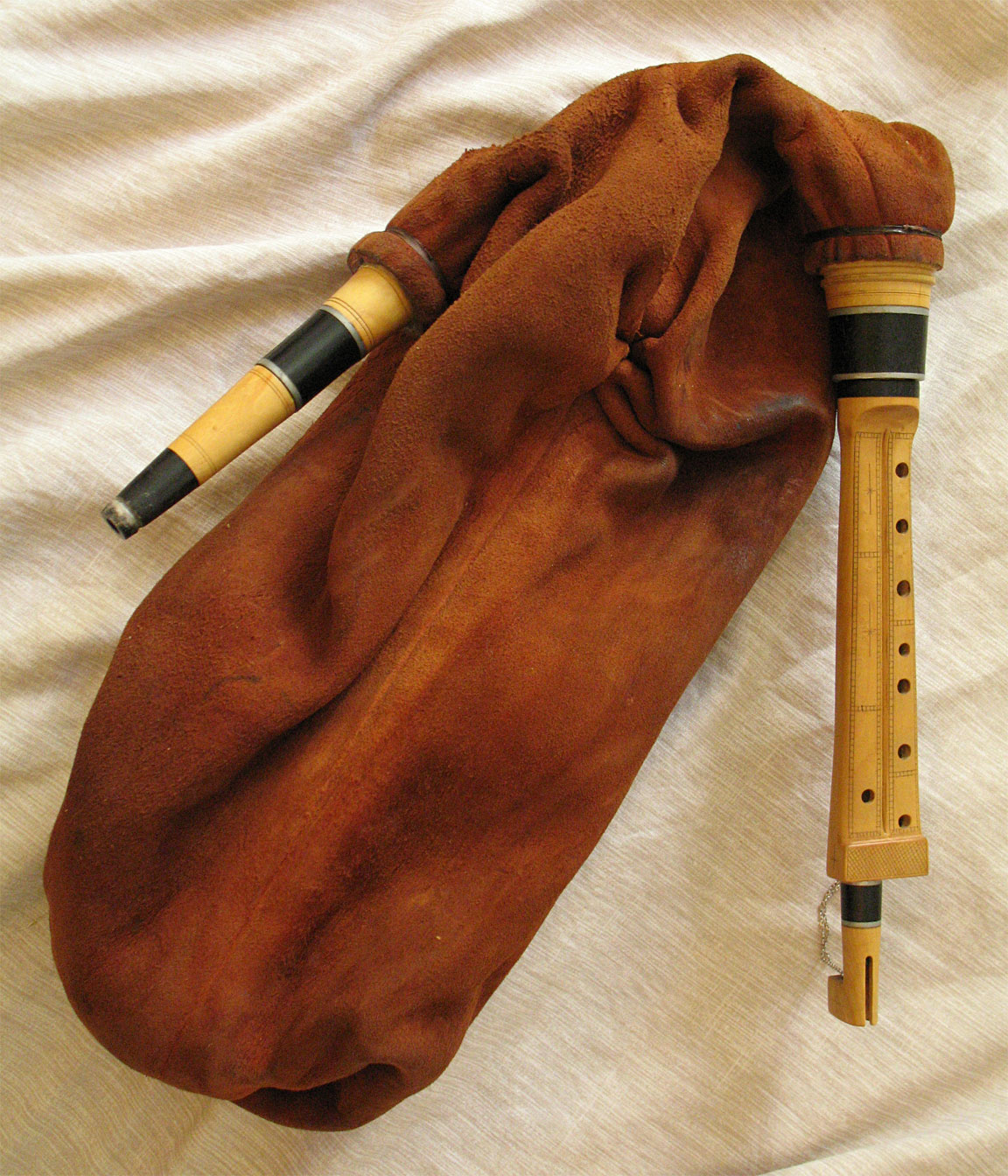 Cornemuse des landes, connue sous le nom gascon de "boha". Instrument de facture récente (2003). Photo : Baudoin Thomas